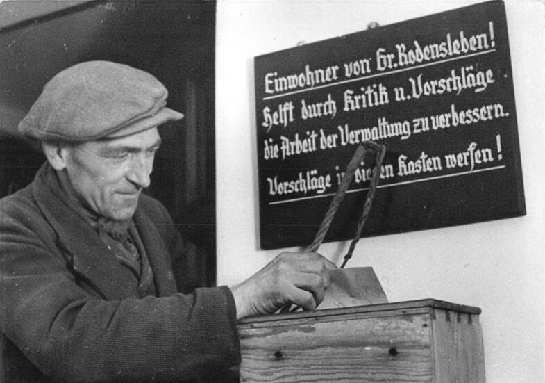 Großrodensleben, Bauer am Kummerkasten Zentralbild Biscan Schw-Wi. 6.3.1953 Dorf des Friedens Groß-Radensleben unterstützt das Nationale Aufbauprogramm der deutschen Hauptstadt. Das erste Jahr des Nationalen Aufbauprogramms der deutschen Hauptstadt wurde zu einem großen Erfolg. An diesem Erfolg sind auch die Bewohner des Dorfes des Friedens Großrodensleben im Kreis Wanzleben beteiligt, die das Nationale Aufbauprogramm durch besondere Geld- und Lebensmittelspenden unterstützt haben. Auch im zweiten Jahr des Nationalen Aufbauprogramms werden die werktätigen Bauern von Groß-Rodensleben den Neuaufbau der deutschen Hauptstadt aktiv unterstützen. UBz: Die Aufforderung zur Kritik und Mitarbeit an der Verwaltung des Dorfes wird von den werktätigen Bauern rege befolgt. Der Mittelbauer Karl Goedecke, Mitglied der DBD, übermittelt hier der Verwaltung einen Vorschlag zur Verbesserung der Brennstoffbesorgung der Dorfbevölkerung.